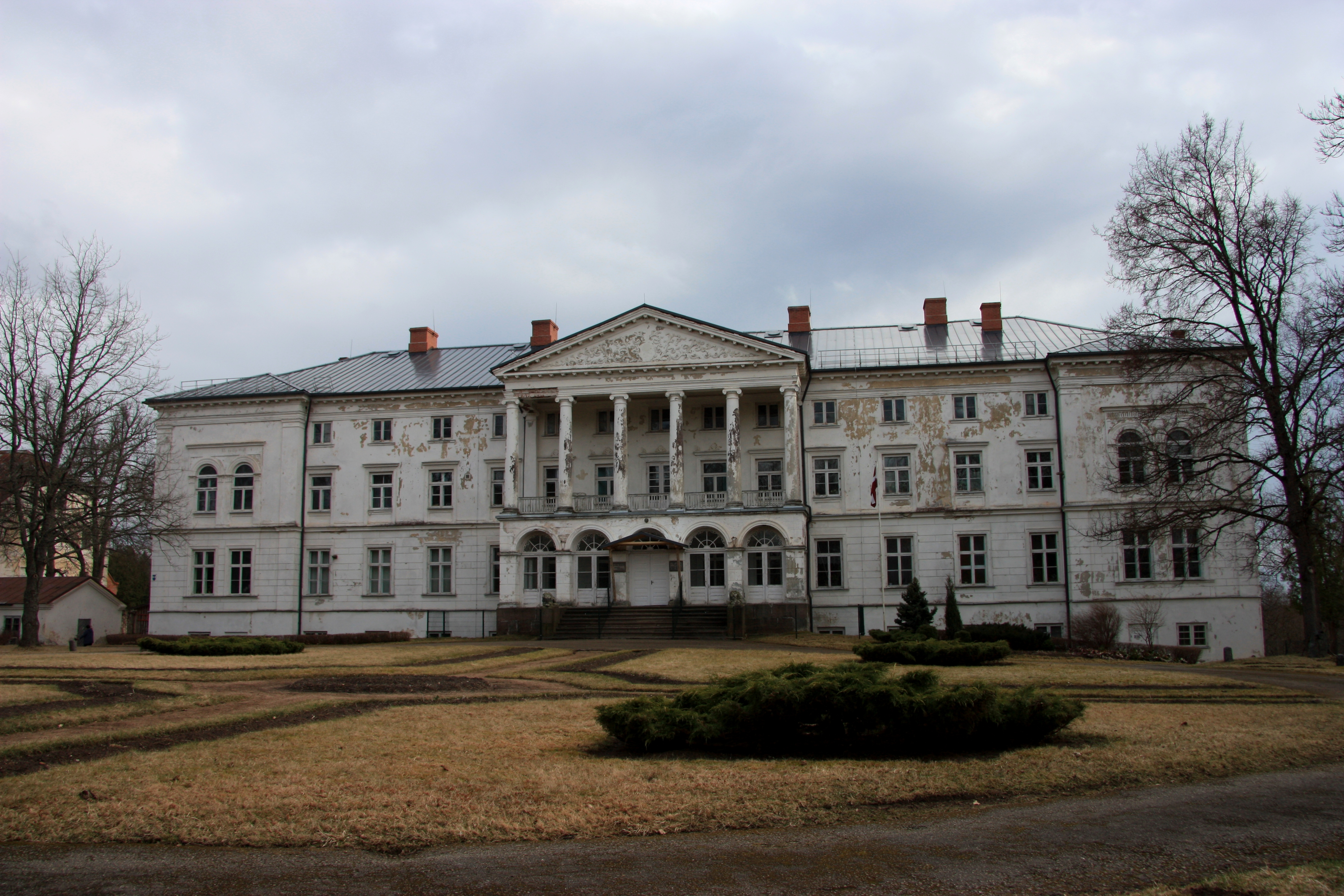 Šobrīd muiža atrodas Ojāra Vācieša Gaujienas vidusskola